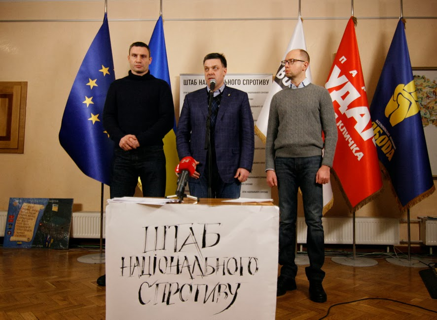 брифінг лідерів опозиції